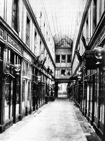 Passage de l'Opéra (Galerie du Baromètre), IXe arrondissement, Paris, France, vers 1909